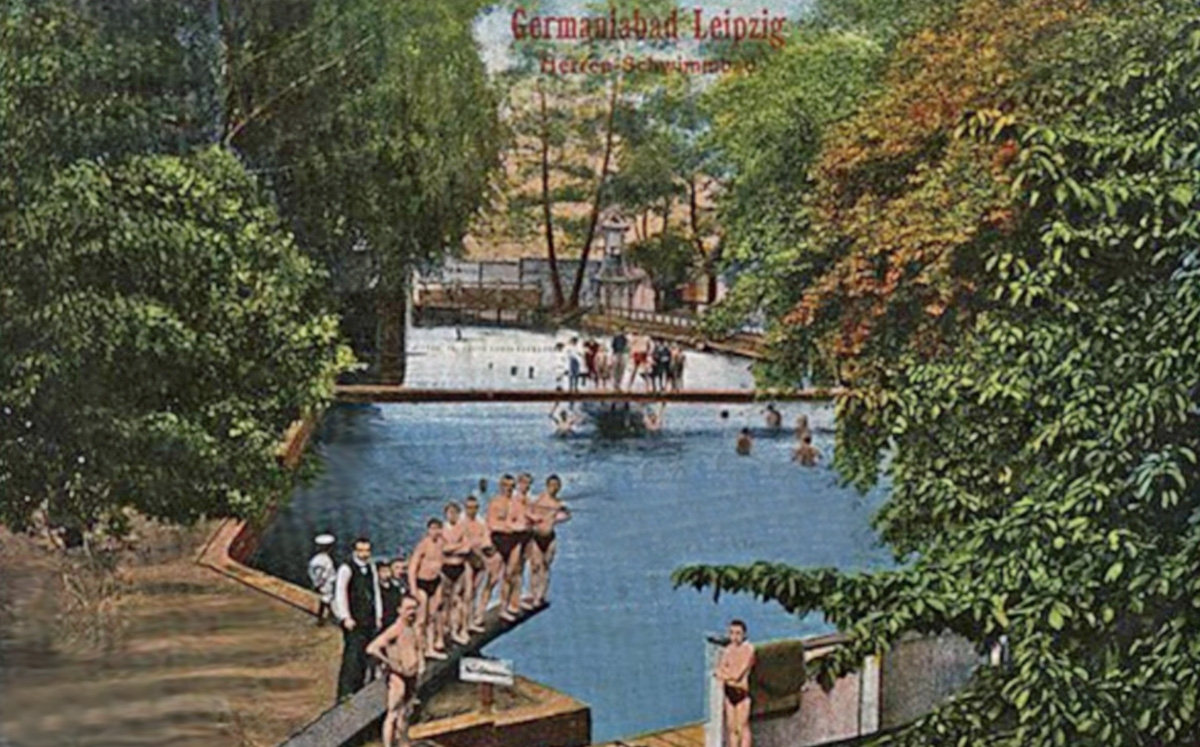 Das Herrenschwimmbecken im Germaniabad Leipzig 1916